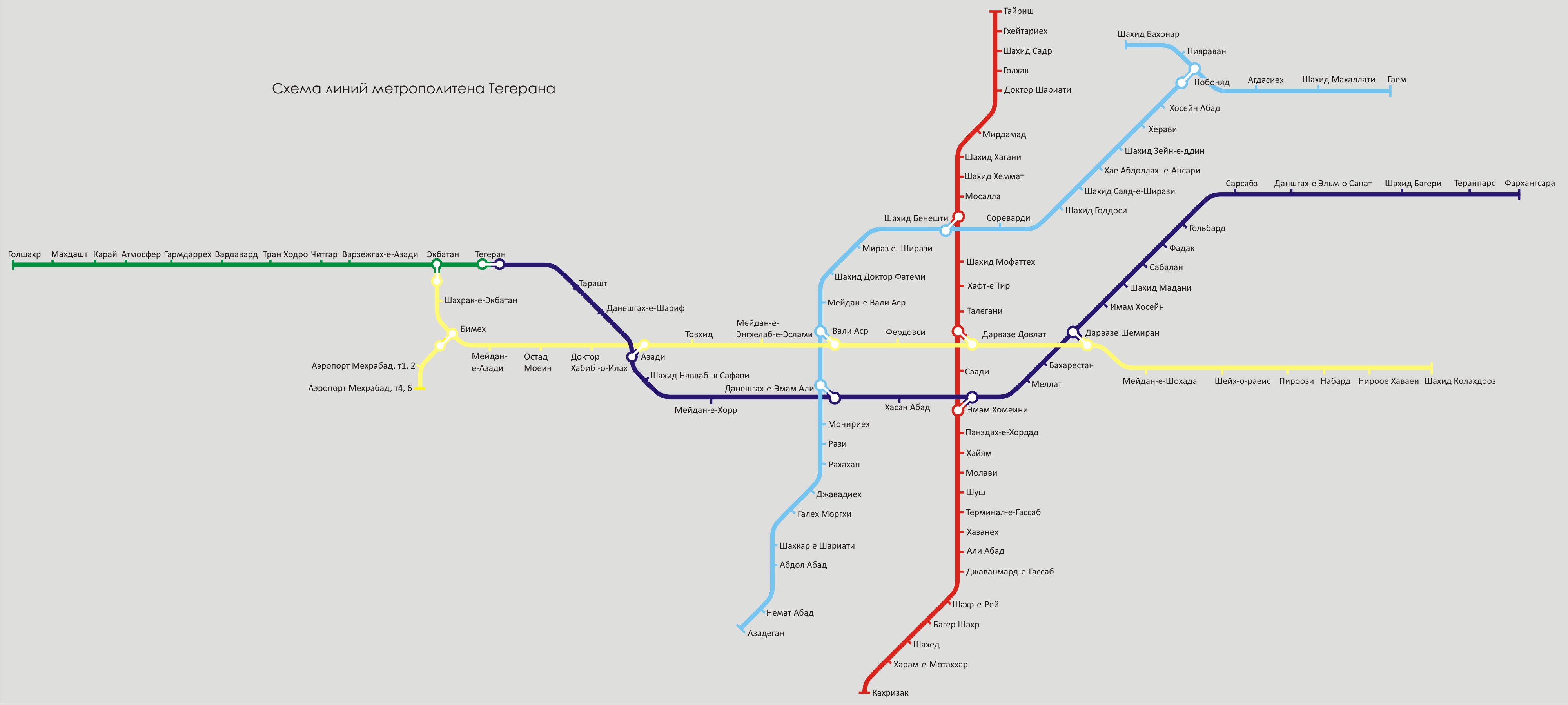 Схема линий метрополитена Тегерана